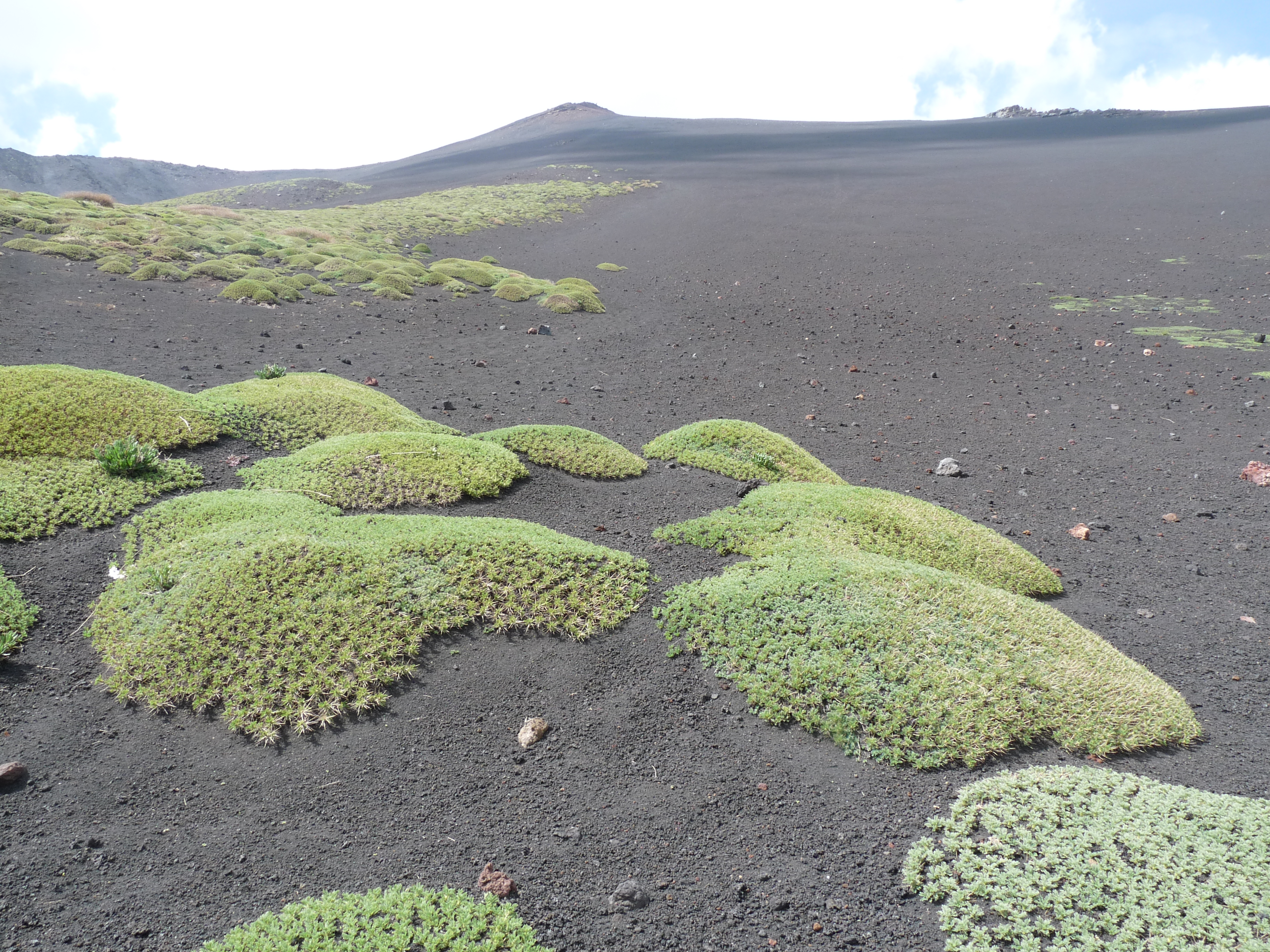 Végétation clairsemée sur les pentes de l'Etna (Sicile) : coussins d'Astragalus siculus, espèce endémique.